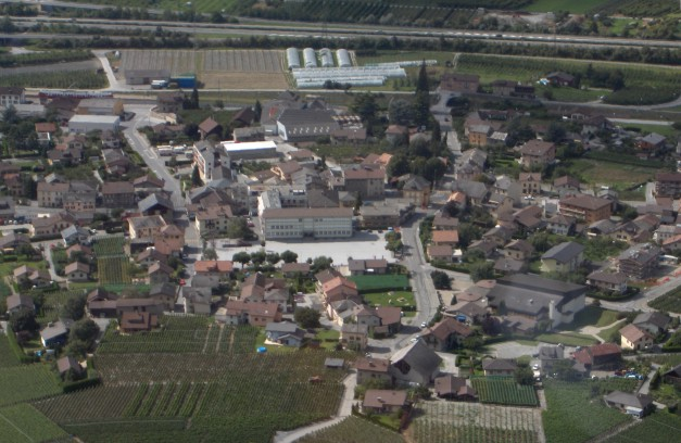 Riddes depuis le téléphérique TRI